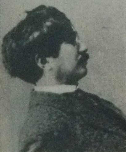 青柳有美